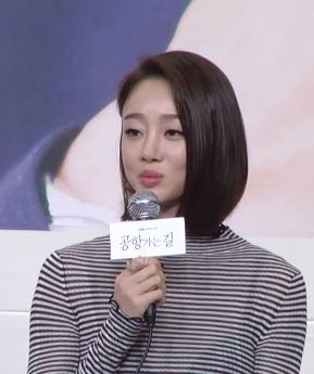 KBS 수목드라마 '공항가는 길' 제작발표회